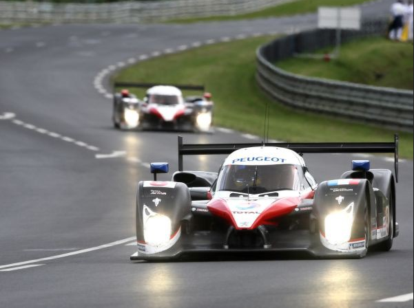 Peugeot 908 en pista